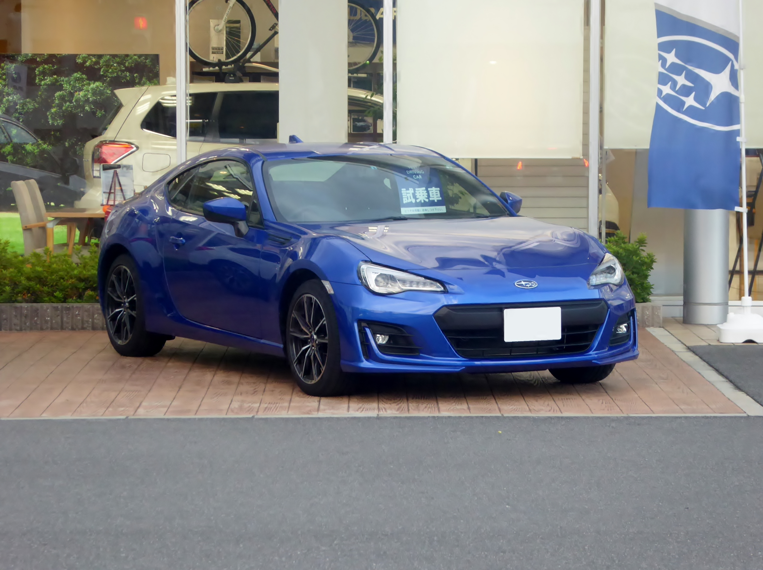 DBA-ZC6型スバル・BRZ Sを撮影。